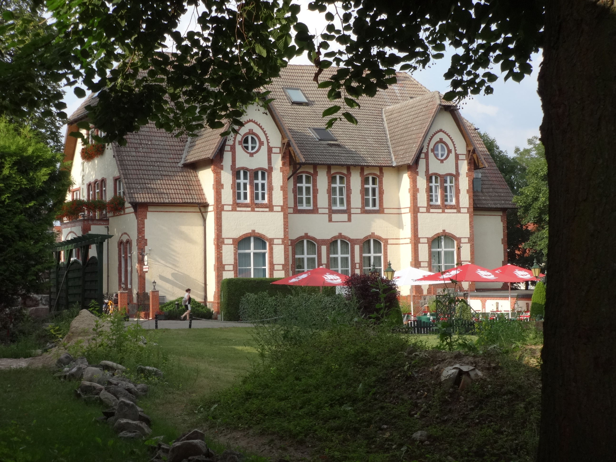 Denkmalgeschützte Villa in Pasewalk. Erbaut 1897 als Sitz des Kommandeurs des Kürassier-Regiments, heute Hotel mit Restaurant